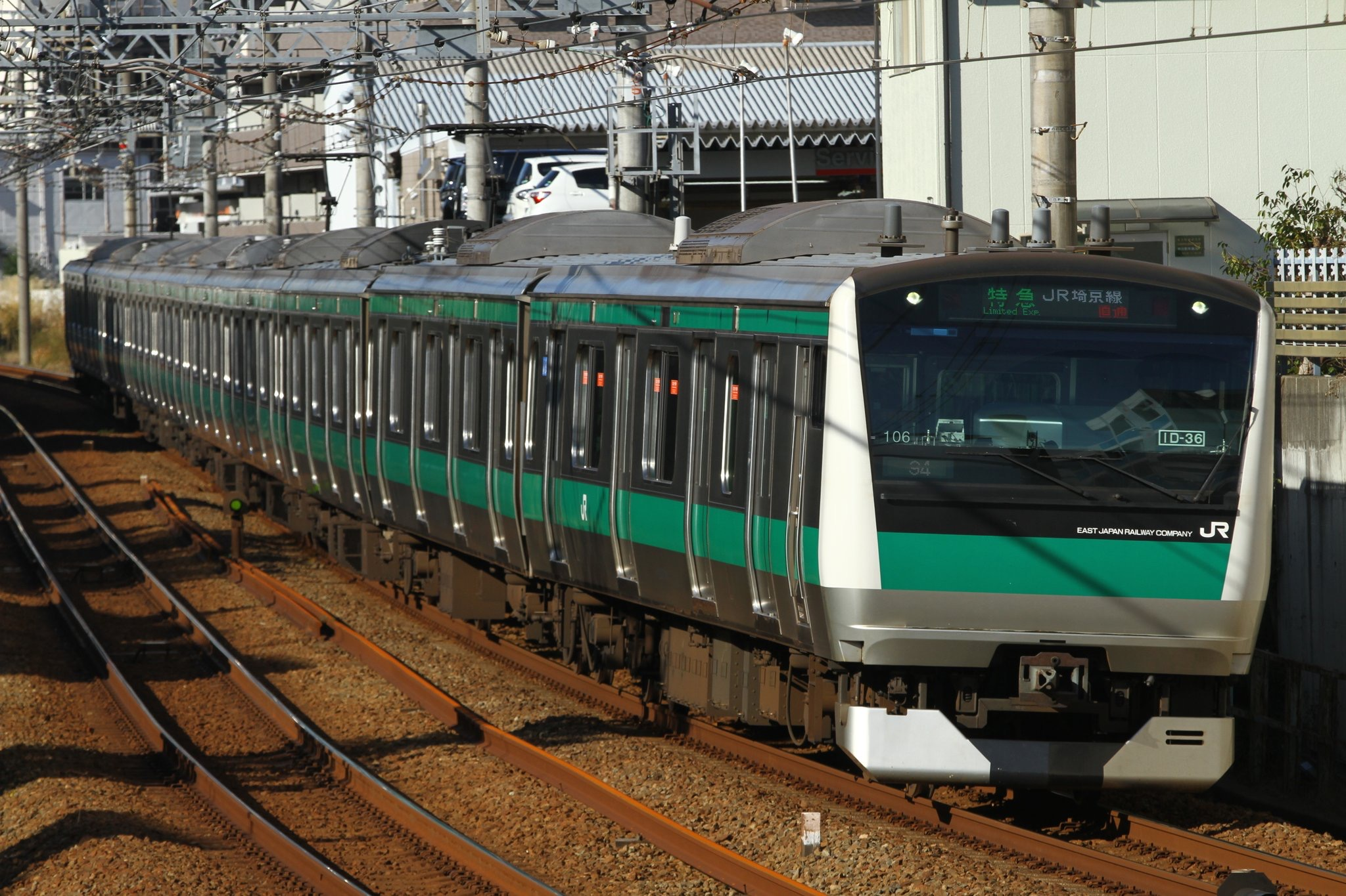 E233系7000番台ハエ106編成 特急新宿行